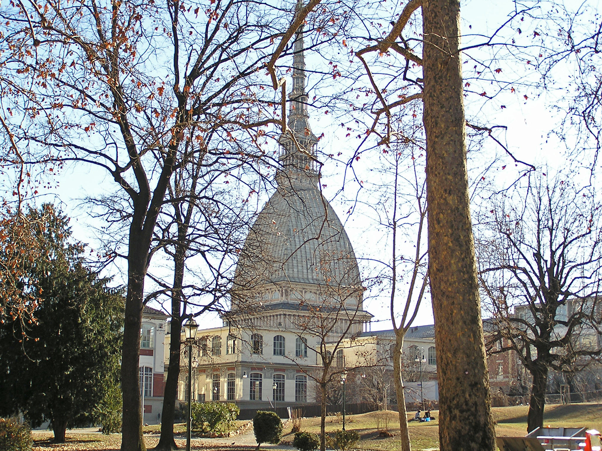 Foto della mole Antonelliana di Torino vista dai giardini Reali Autore: Davide F. Foto scattata nel febbraio 2005